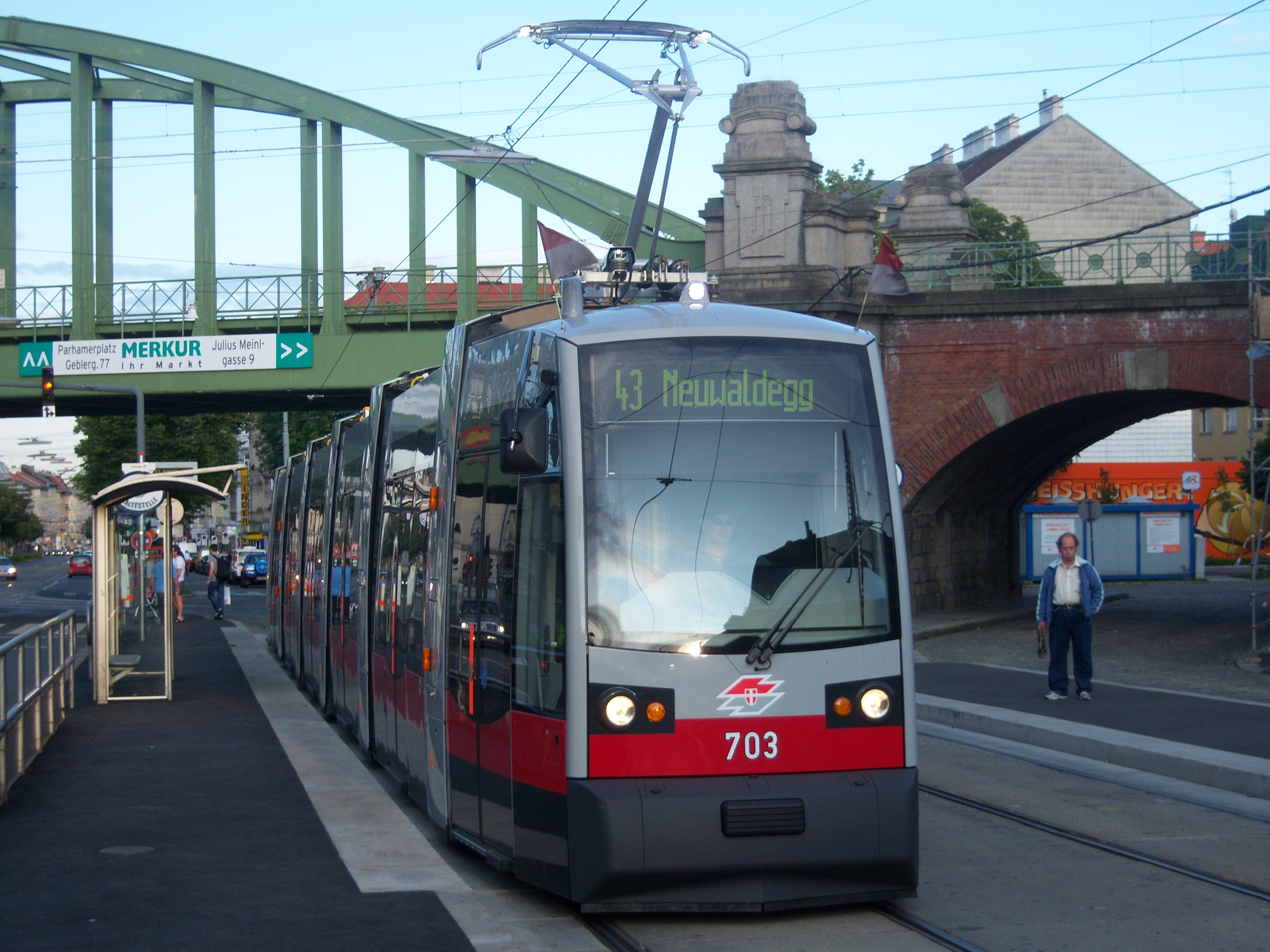 Neuer Fahrzeugtyp ULF B1 an der Station Hernals